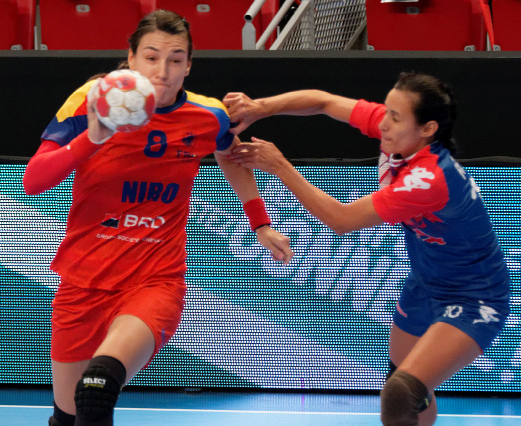 Le 29 novembre 2015, lors du match Roumanie / Cuba pour le compte du TIPIFF 2015. Au stade Pierre de Coubertin à Paris.